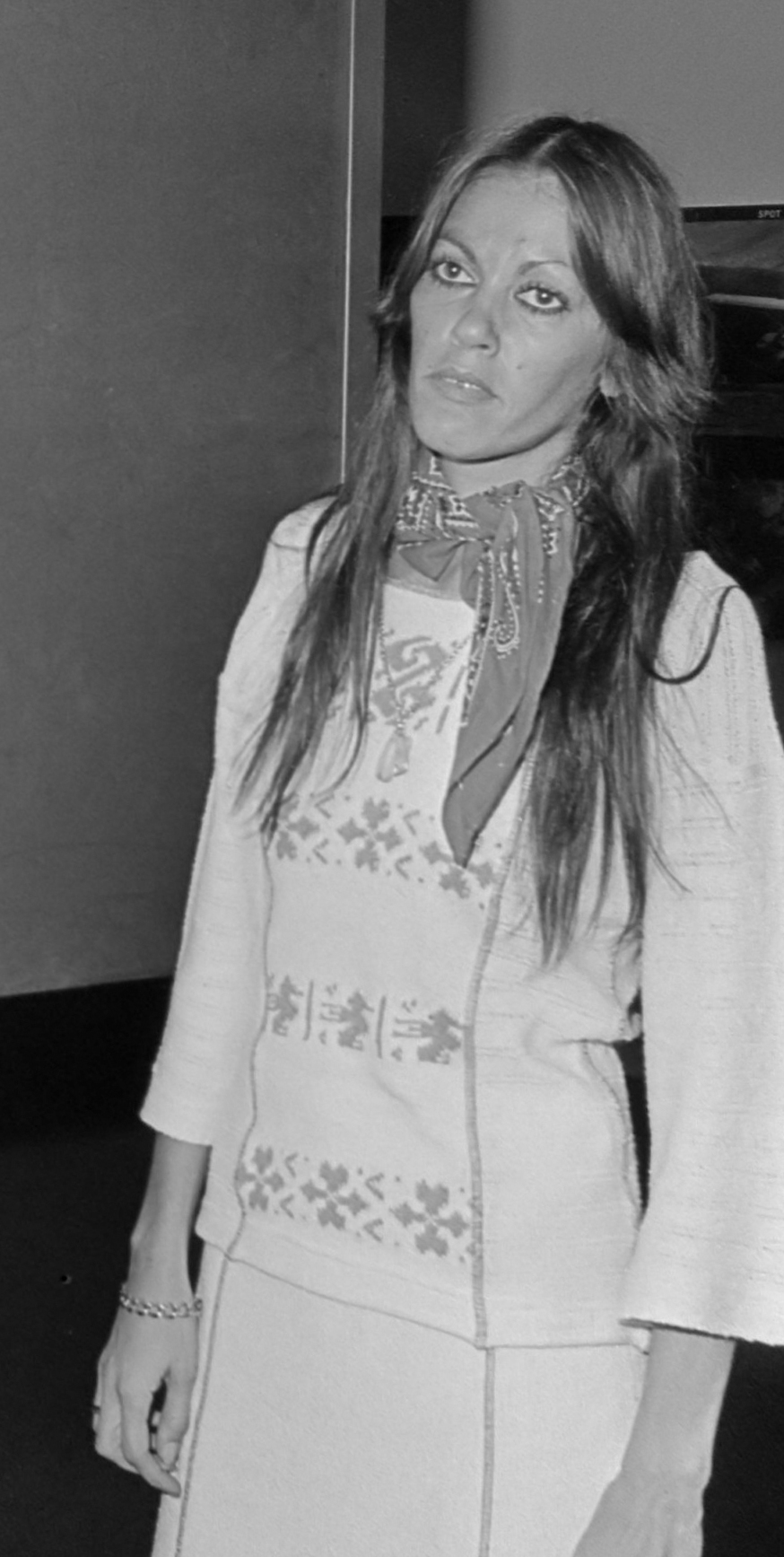 Prijsuitreiking World Press Photo 1976 aan winnares Françoise Demulder. Françoise Demulder bij haar winnende foto 6 april 1977